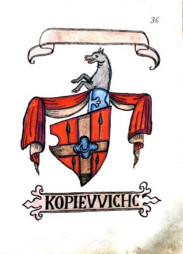 Štit plemićke porodice Kopjević - 15 stoljeće